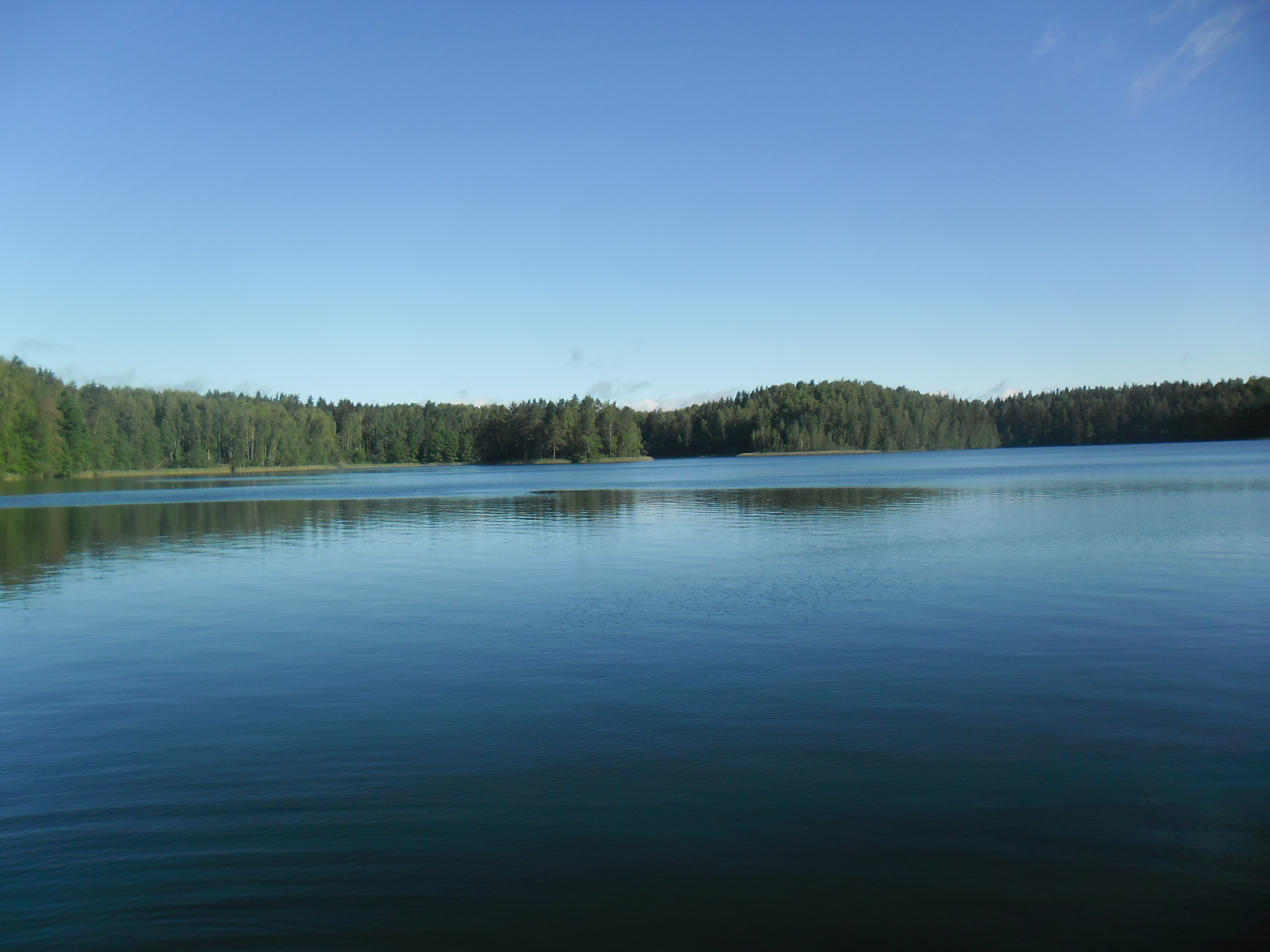 Озеро Чистик, Демидовский район This image is related to the protected area of Russia number 6720042